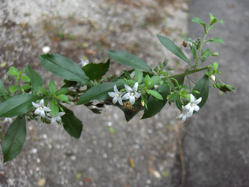 Ditaxis argothamnoides, Florida